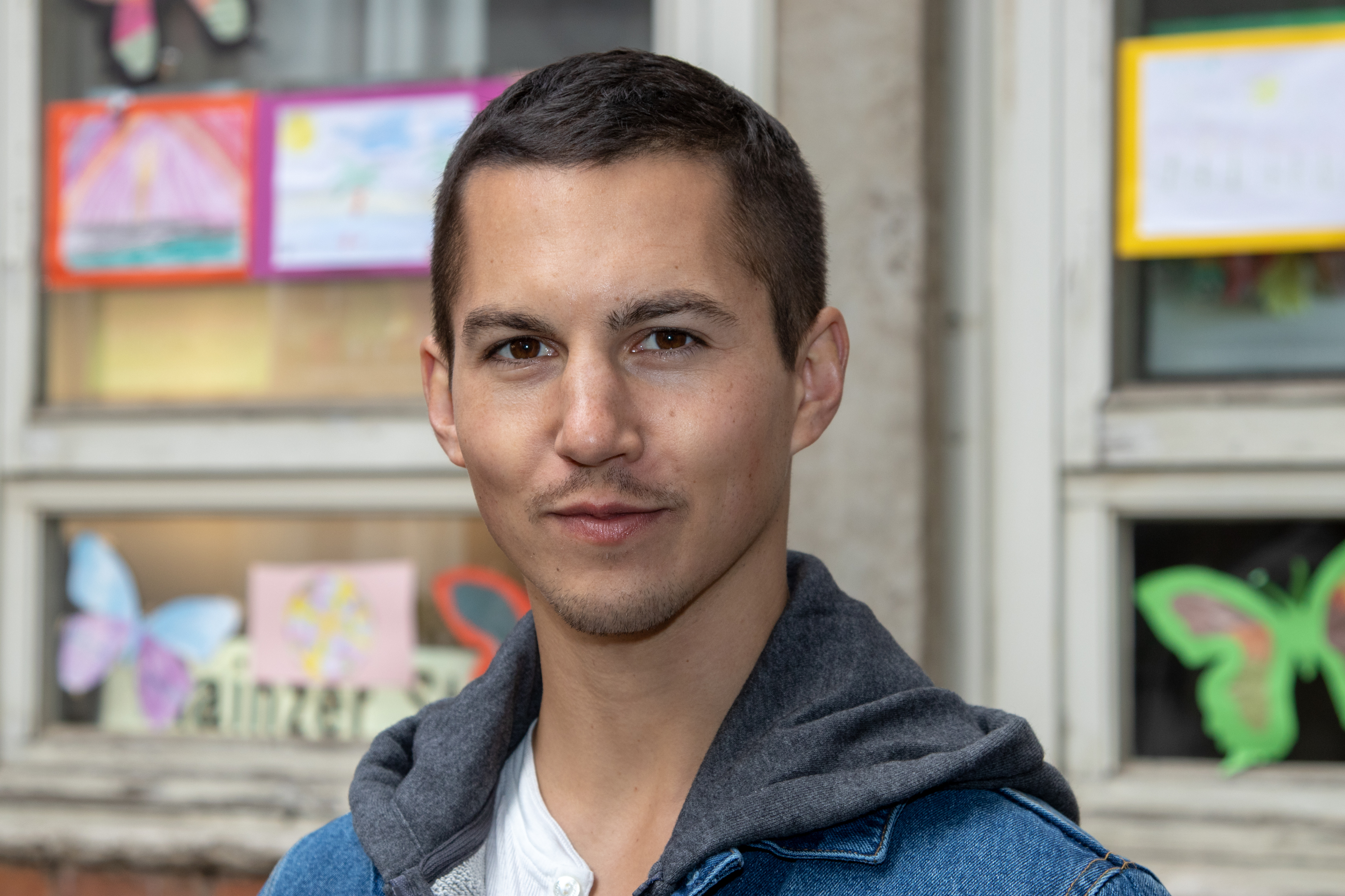 Drehtermin Väter - Allein zu Haus vor der Grundschule Mainzer Straße, Köln. Tim Oliver Schultz